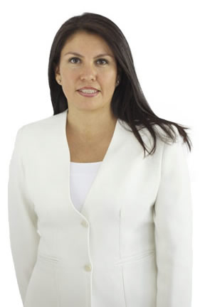 Fotografia Oficial de Hortencia Figueroa Peralta